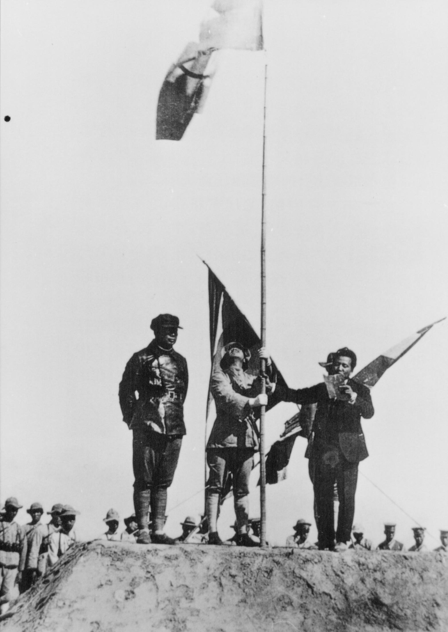 冯玉祥在五原誓师